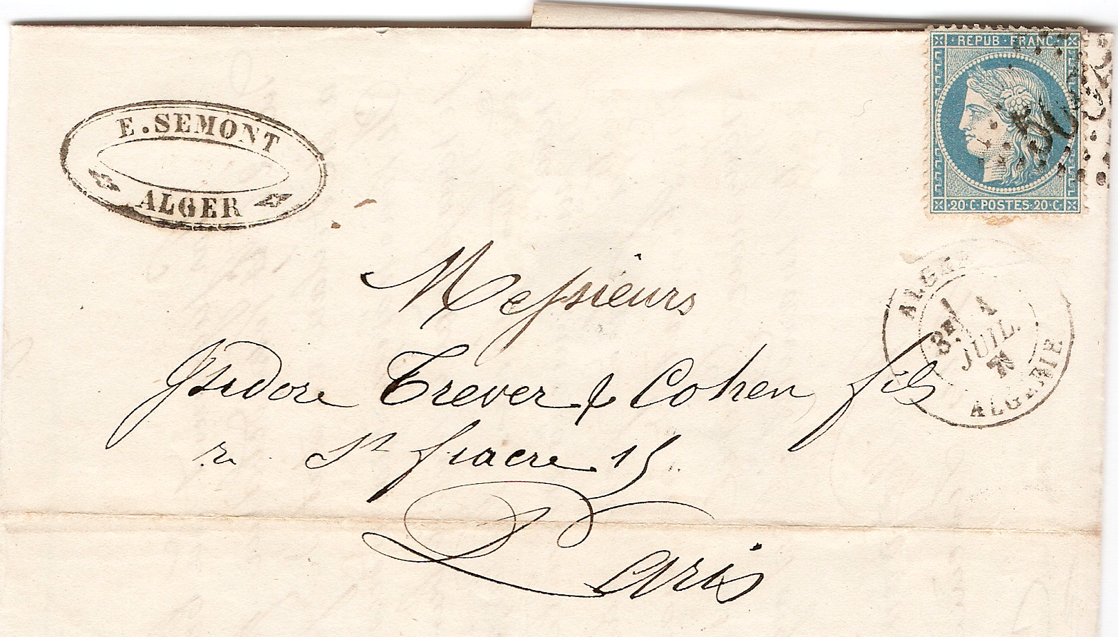 Lettre d'Algérie de 1871, affranchie avec un timbre de France (20c Cérès de 1870) avec oblitération Gros Chiffre 5005